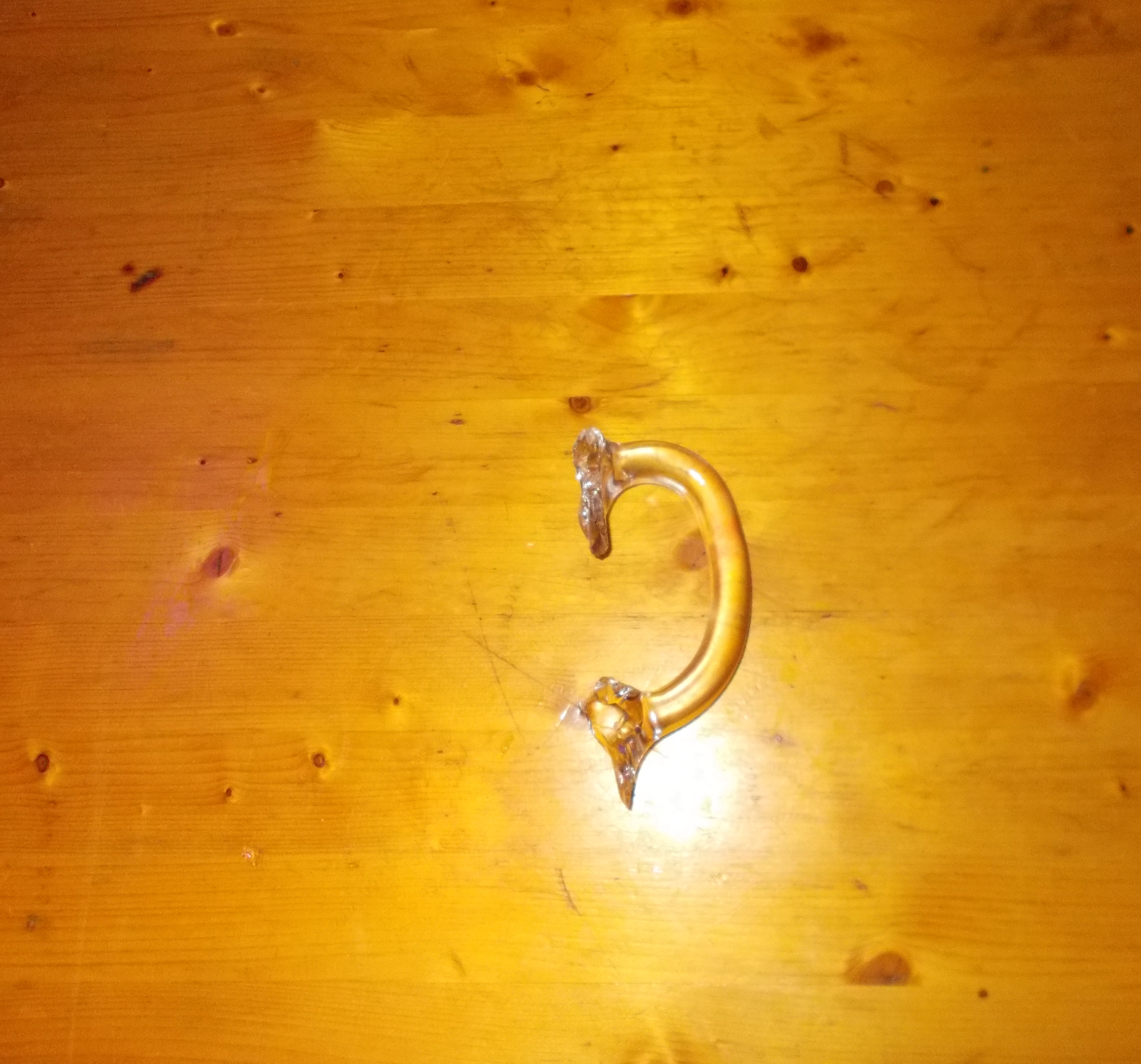 Abgebrochener Henkel eines Bierkruges auf dem Rutenfest 2019